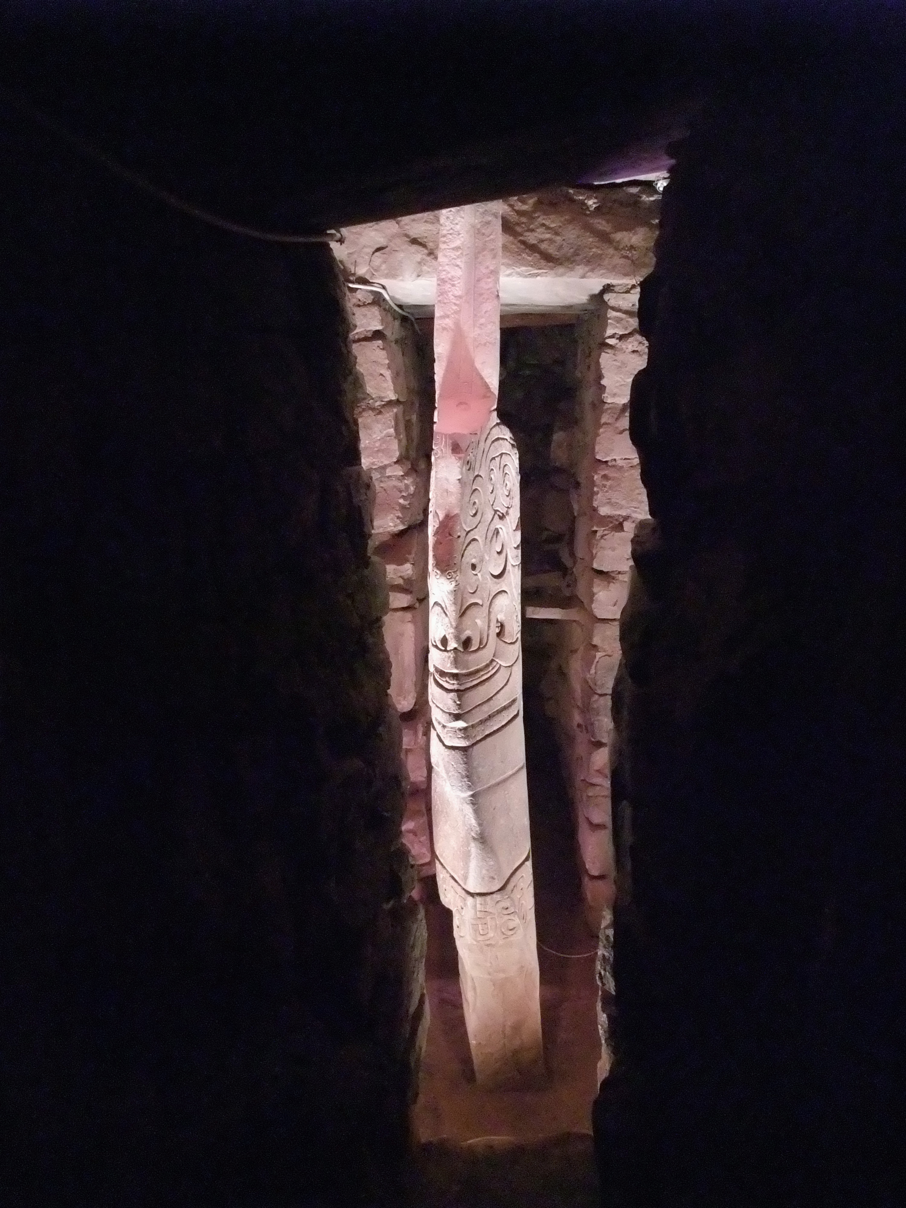 Photo du monolithe "El Lanzón" représentant un dieux de la culture Chavín.